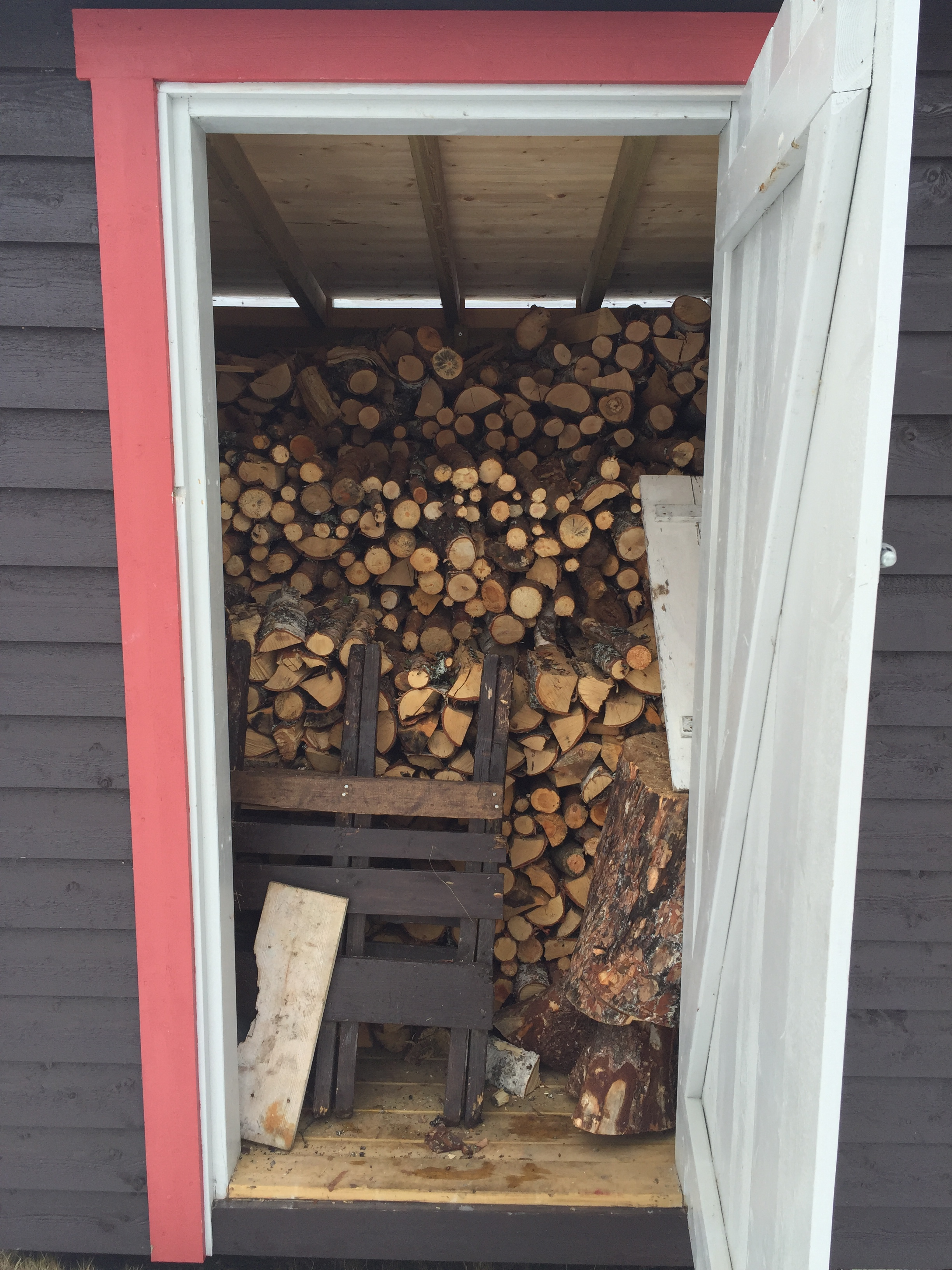 Vedskjul, fra en hytte i Trøndelag.